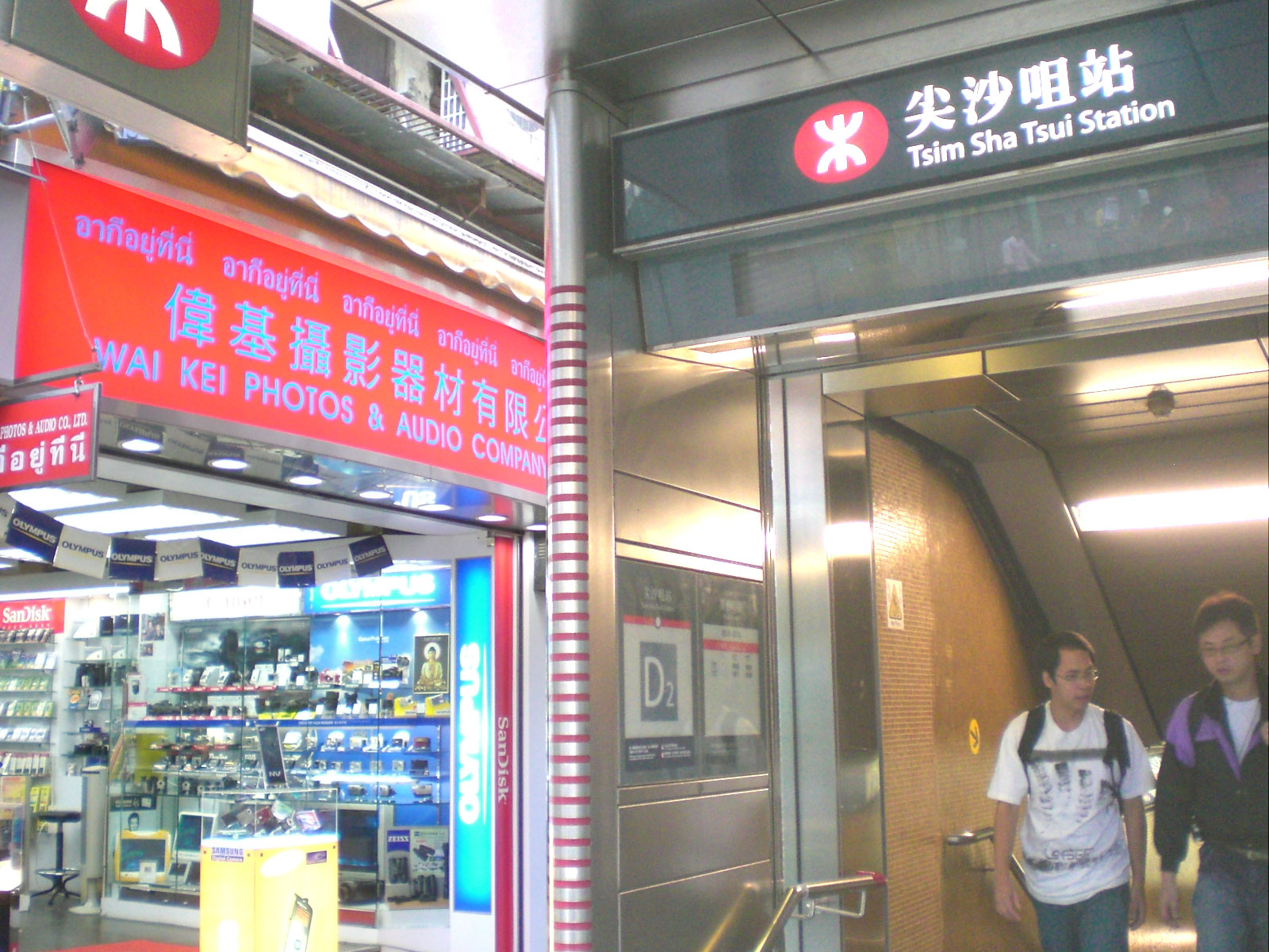 九龍尖沙咀尖沙咀站D2出口, 加拿分道, Carnarvon Road, TST, Hong Kong